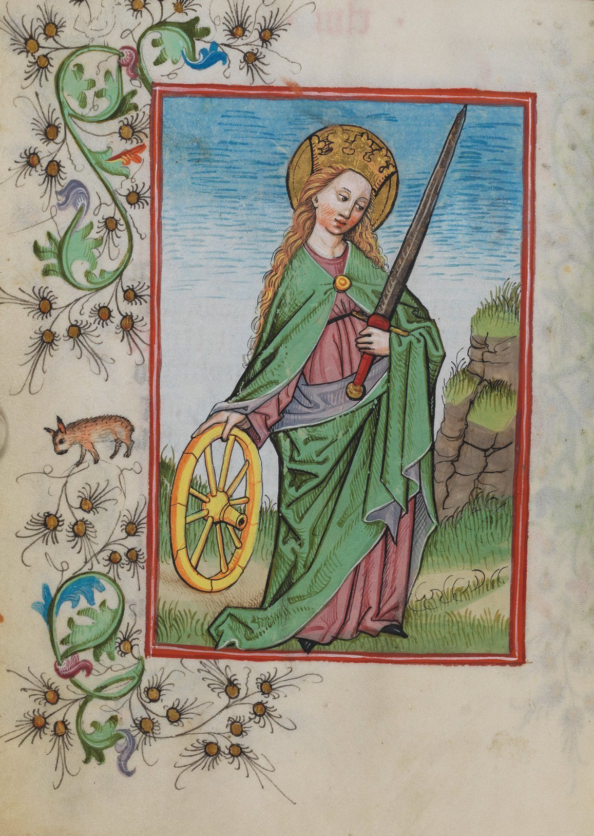 Illuminierte Seite aus dem Waldburg-Gebetbuch, WLB Stuttgart, Cod. brev. 12, fol. 47v